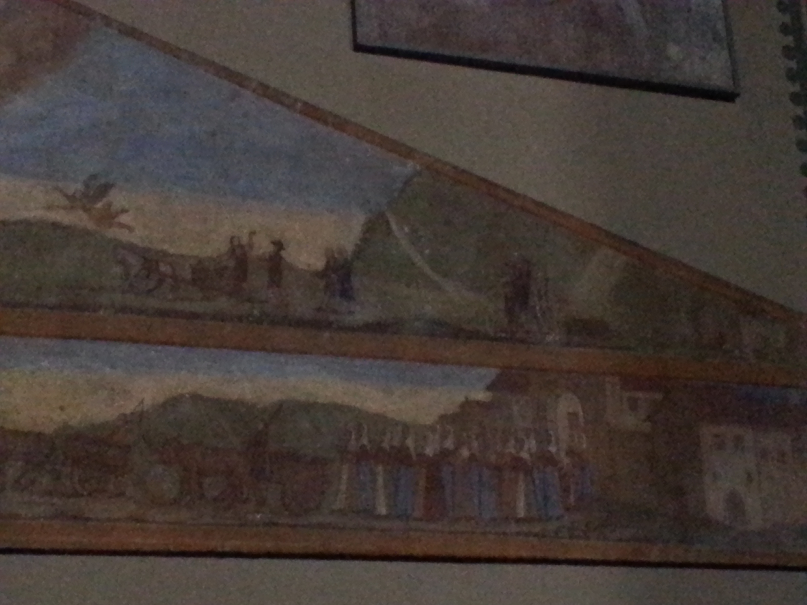 Affresco della peste- Giovan Battista Brighenti- Chiesa del Paradiso